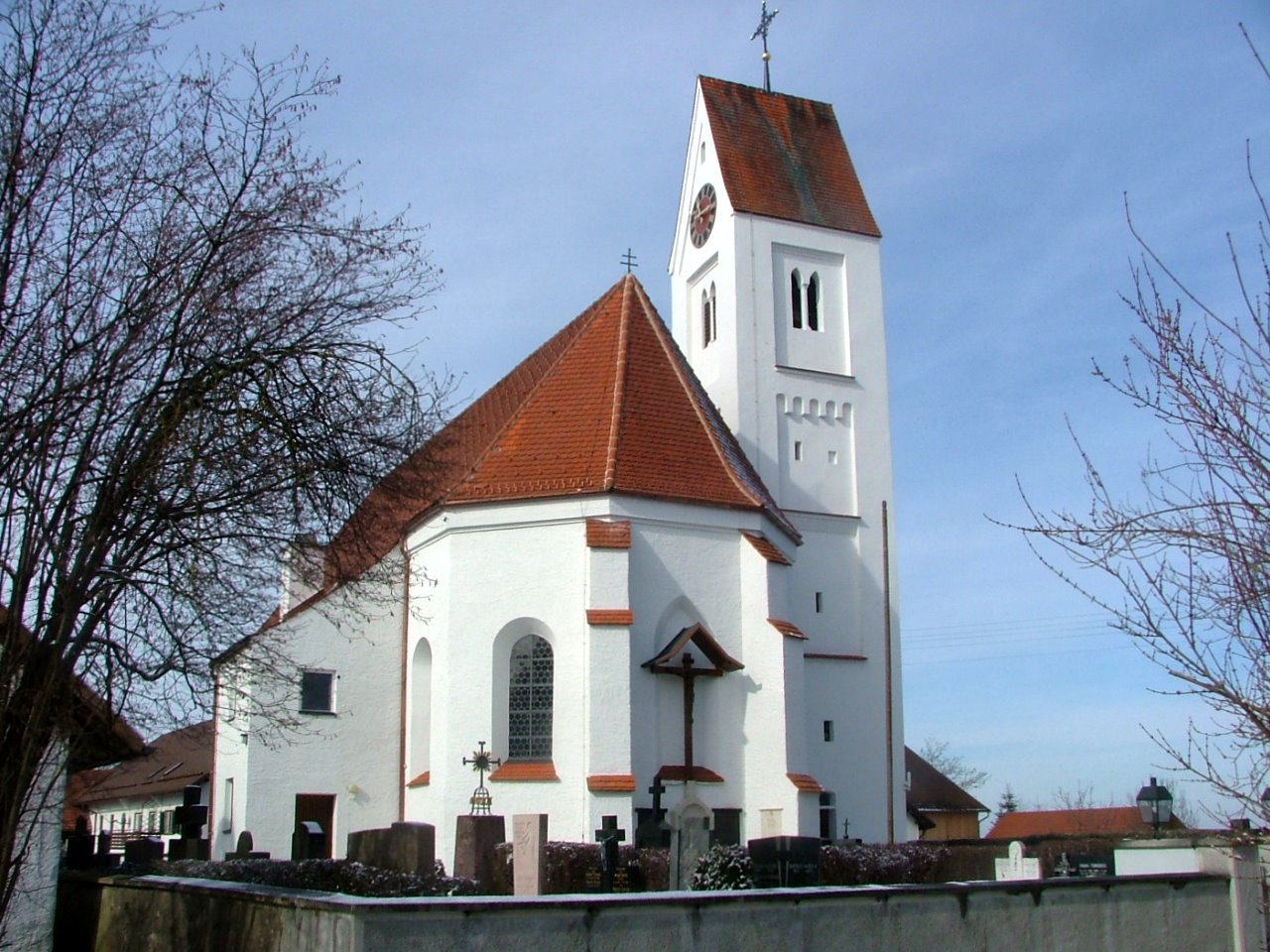 Warmisried